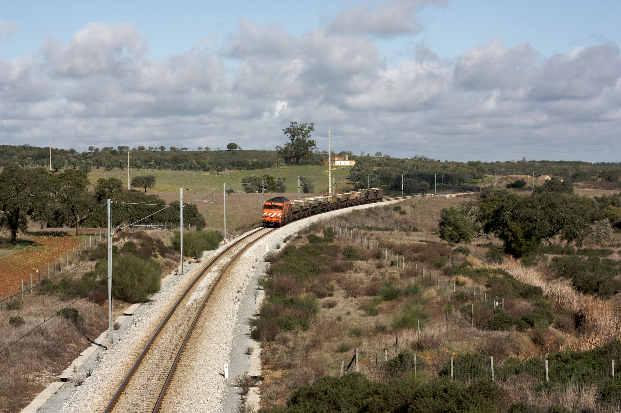 Tipo: Comboio de Transporte de Areia 96207 [Ramal Somincor - Loulé] Local: Azinheira dos Barros [Linha do Sul, PK 120] Data e hora: 2 de Fevereiro de 2009 [11h53] Material: Locomotiva 1909 + 10 vagões (8 Transfesa Faoos e 2 CP Falls)